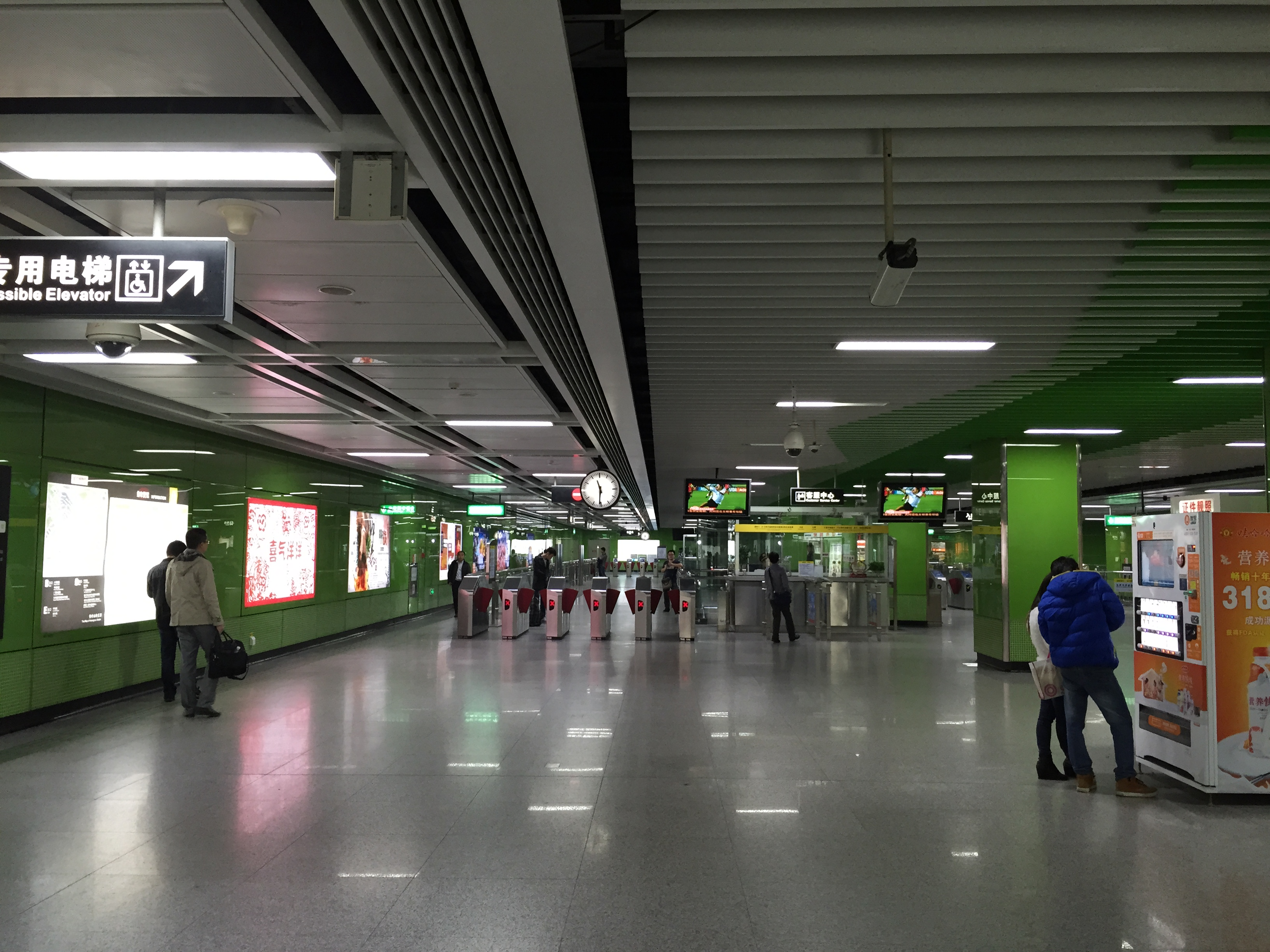 广州地铁黄村站站厅